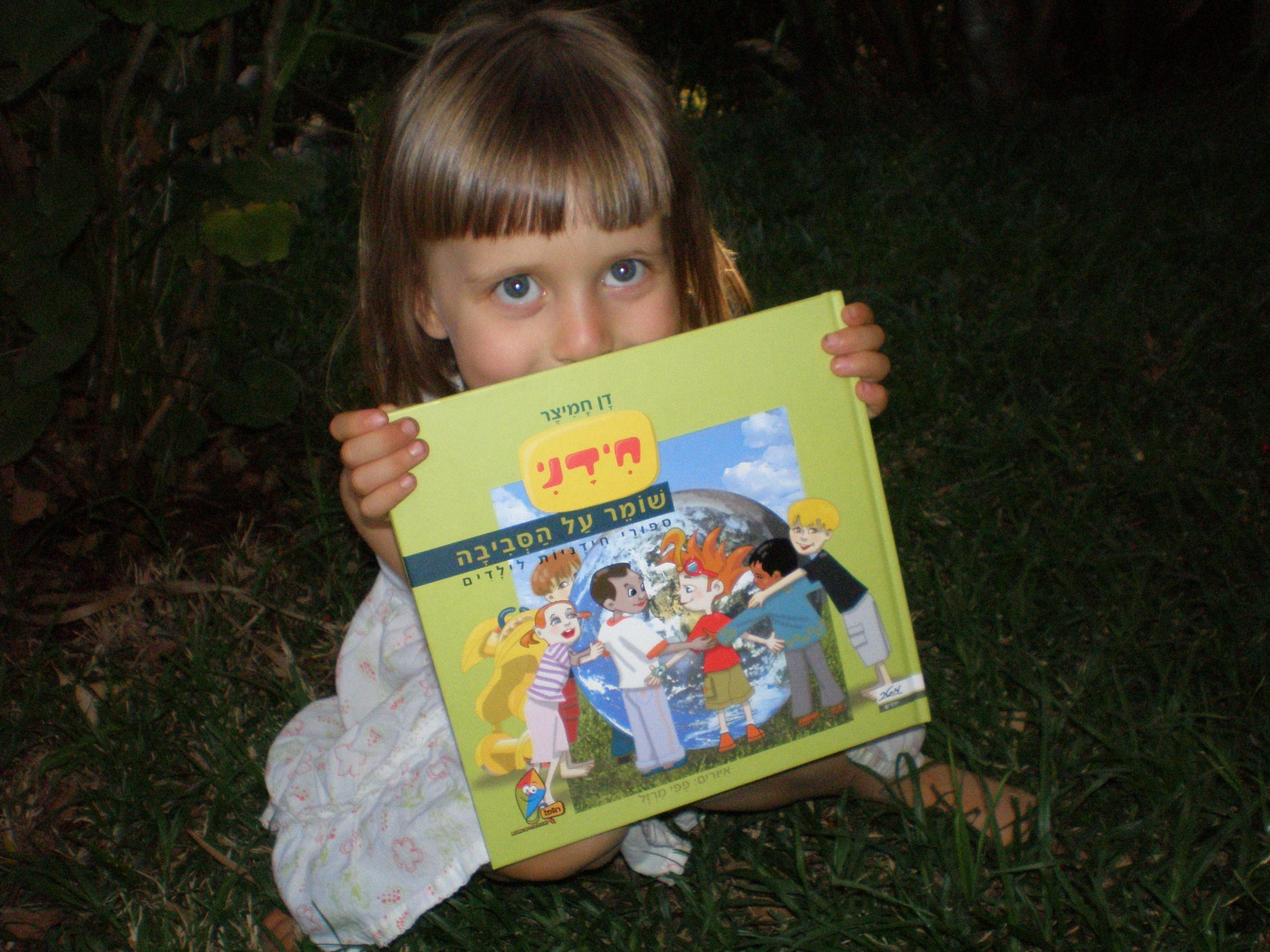 מושג חדש לילדים חידניות